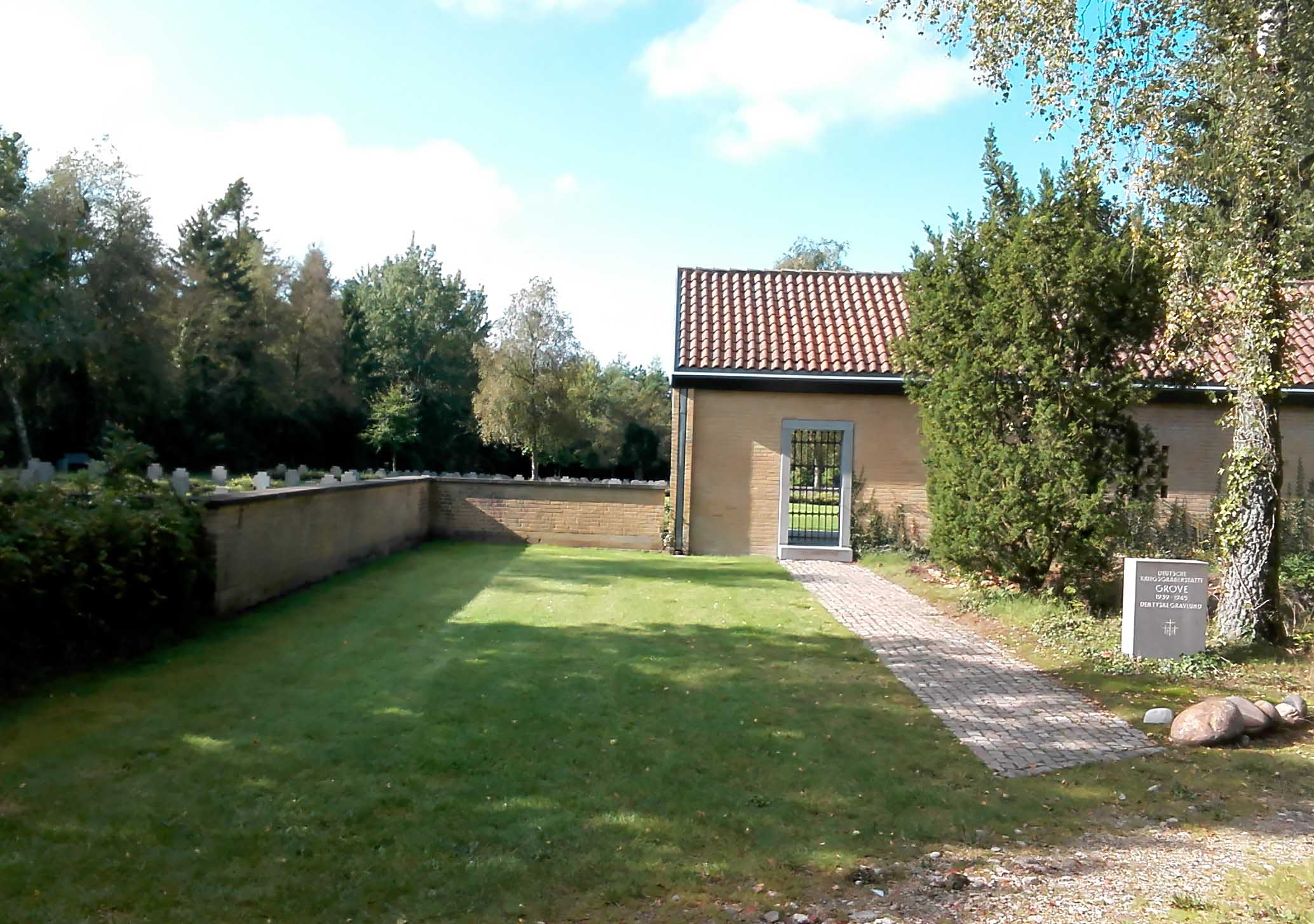 Den tyske gravlund ved Grove Kirke